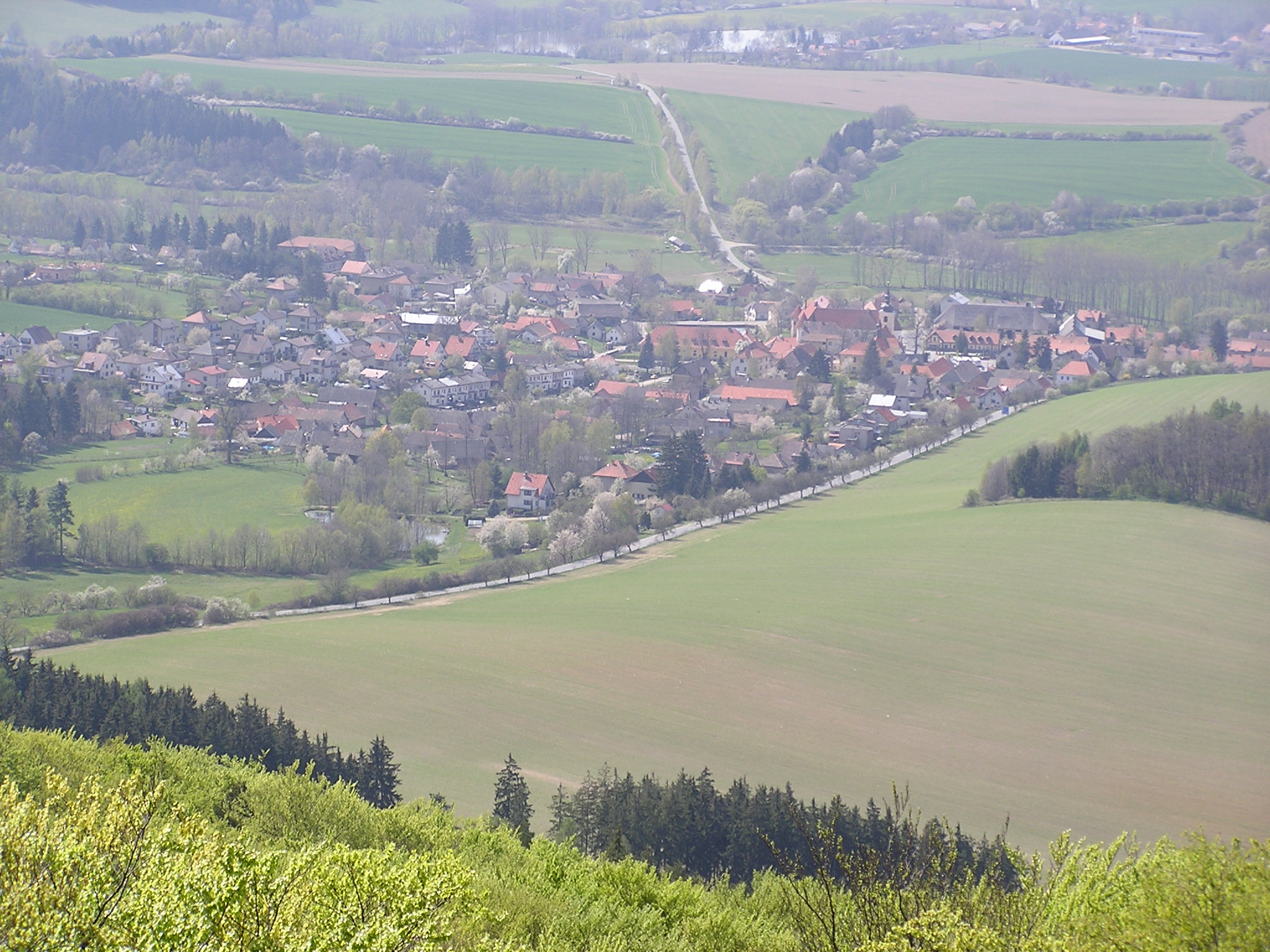 Louňovice pod Blaníkem